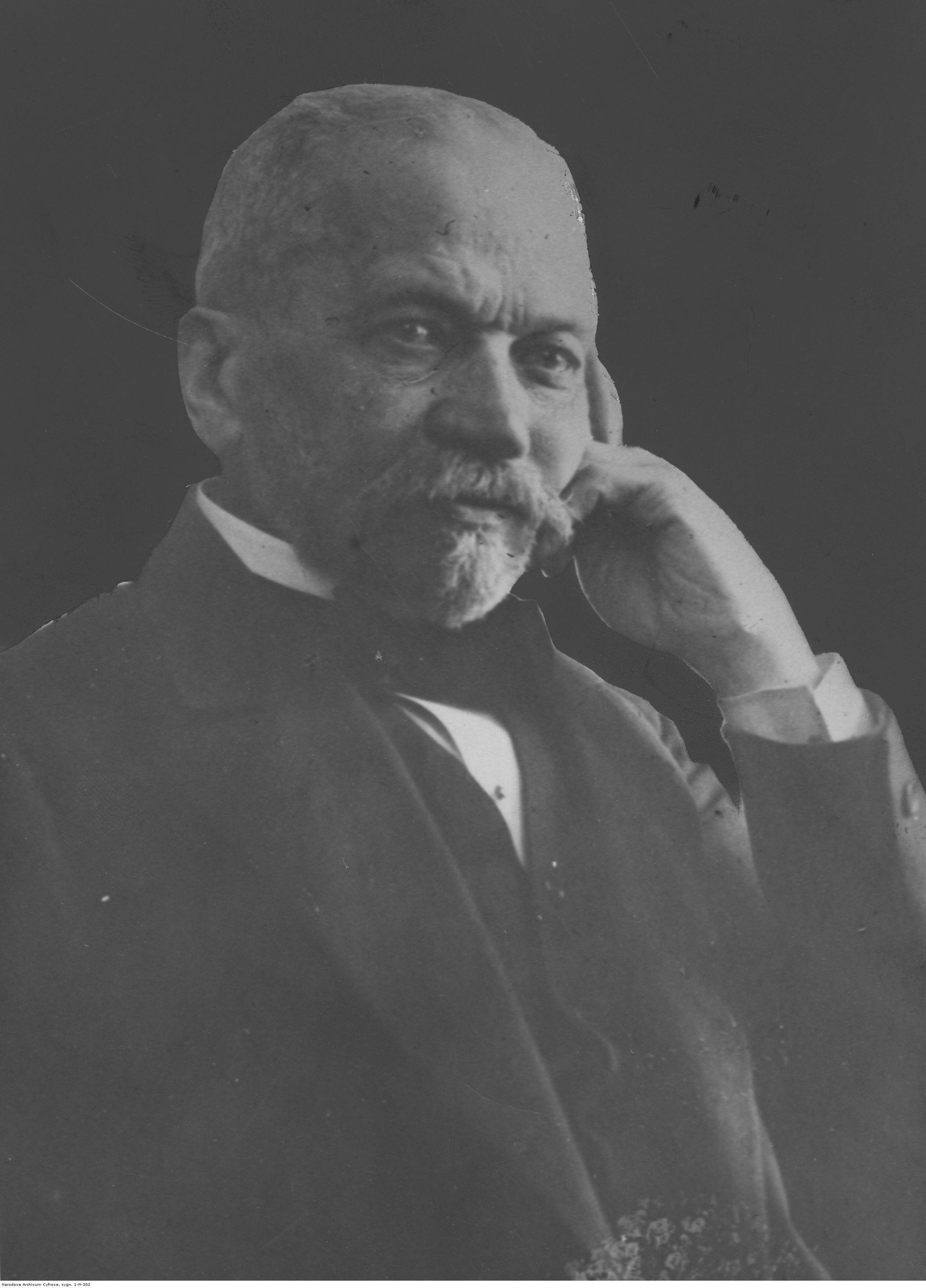 Sygnatura: 1-N-302